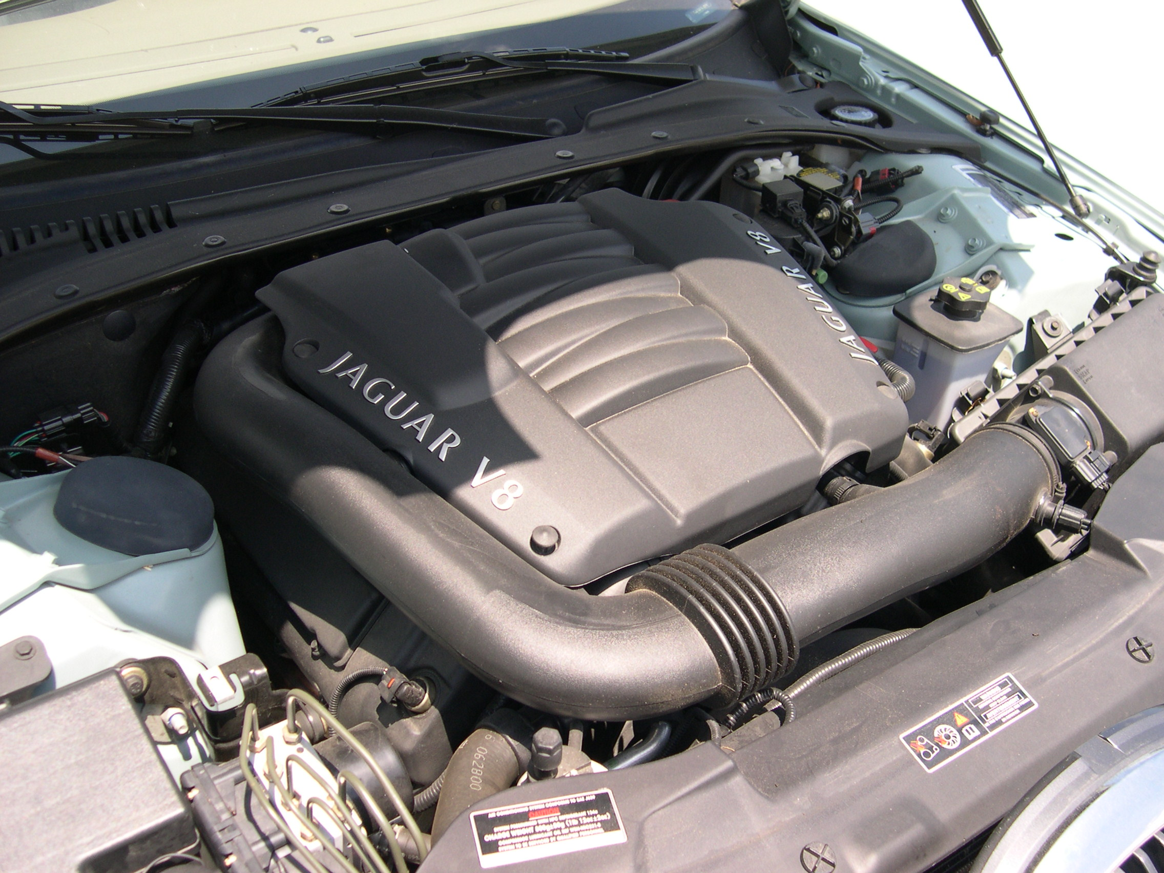 2001 Jaguar S-Type